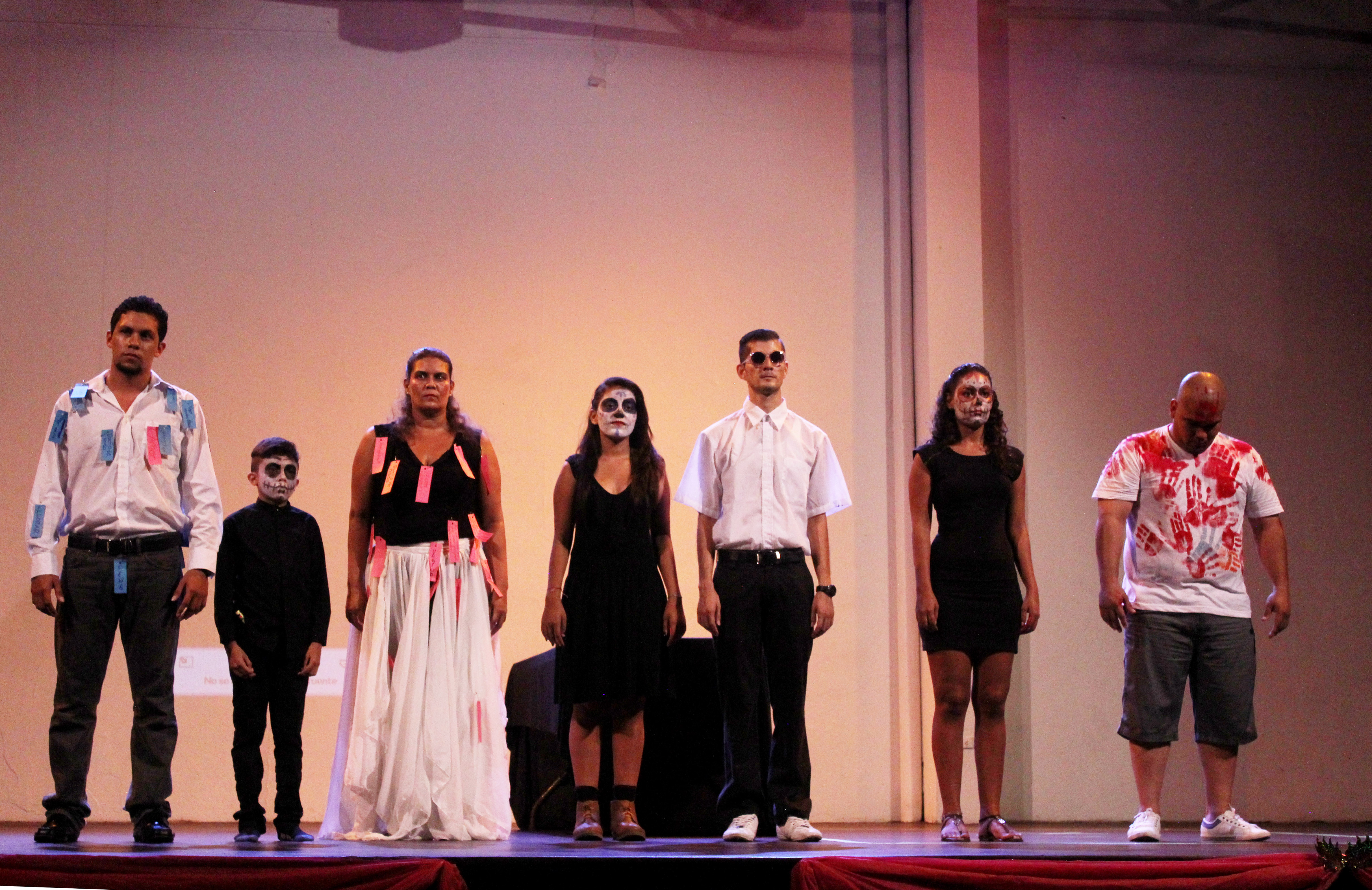 Elenco de la obra "Performaciones" (2015) en el Festival Nacional de Teatro Chucheca de Oro.